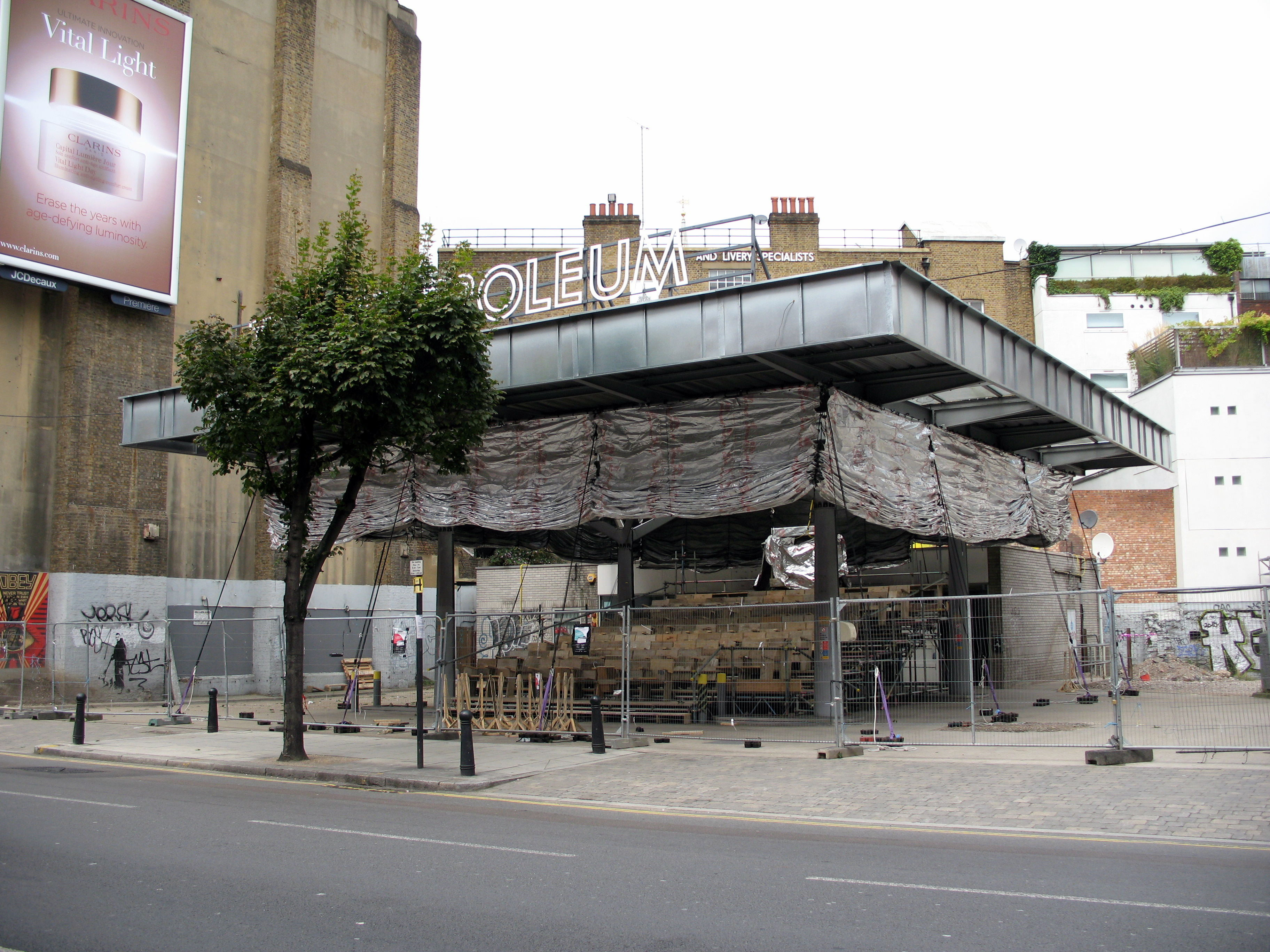 Ένα πρατήριο βενζίνης που μετατράπηκε σε κινηματογράφο.